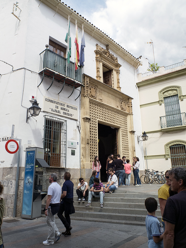 El Conservatorio Superior de Córdoba «Rafael Orozco» es un edificio de estilo renacentista; el Conservatorio se creó en 1902 y es uno de los más antiguos de España.